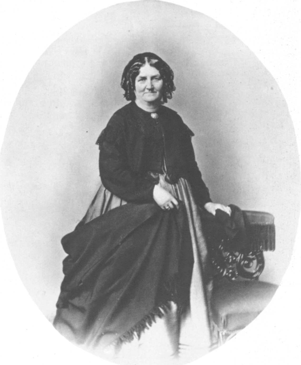 Malwina Schnorr-Carolsfeld